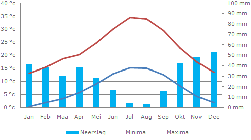 Klimatogram van de stad Granada in Zuid Spanje